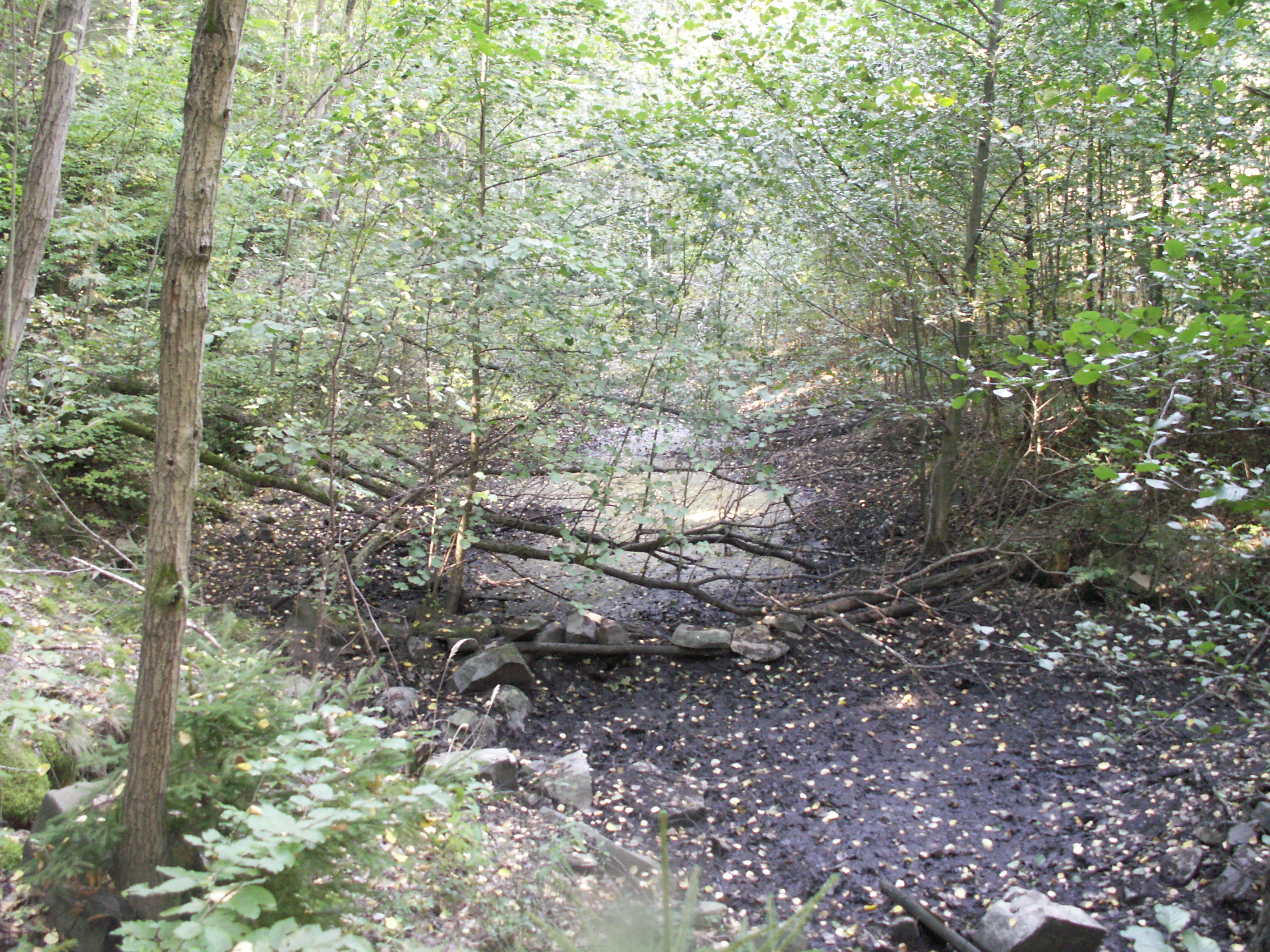 přírodní památka v okrese Vyškov